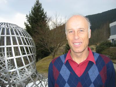 Foto von Ernst Hairer